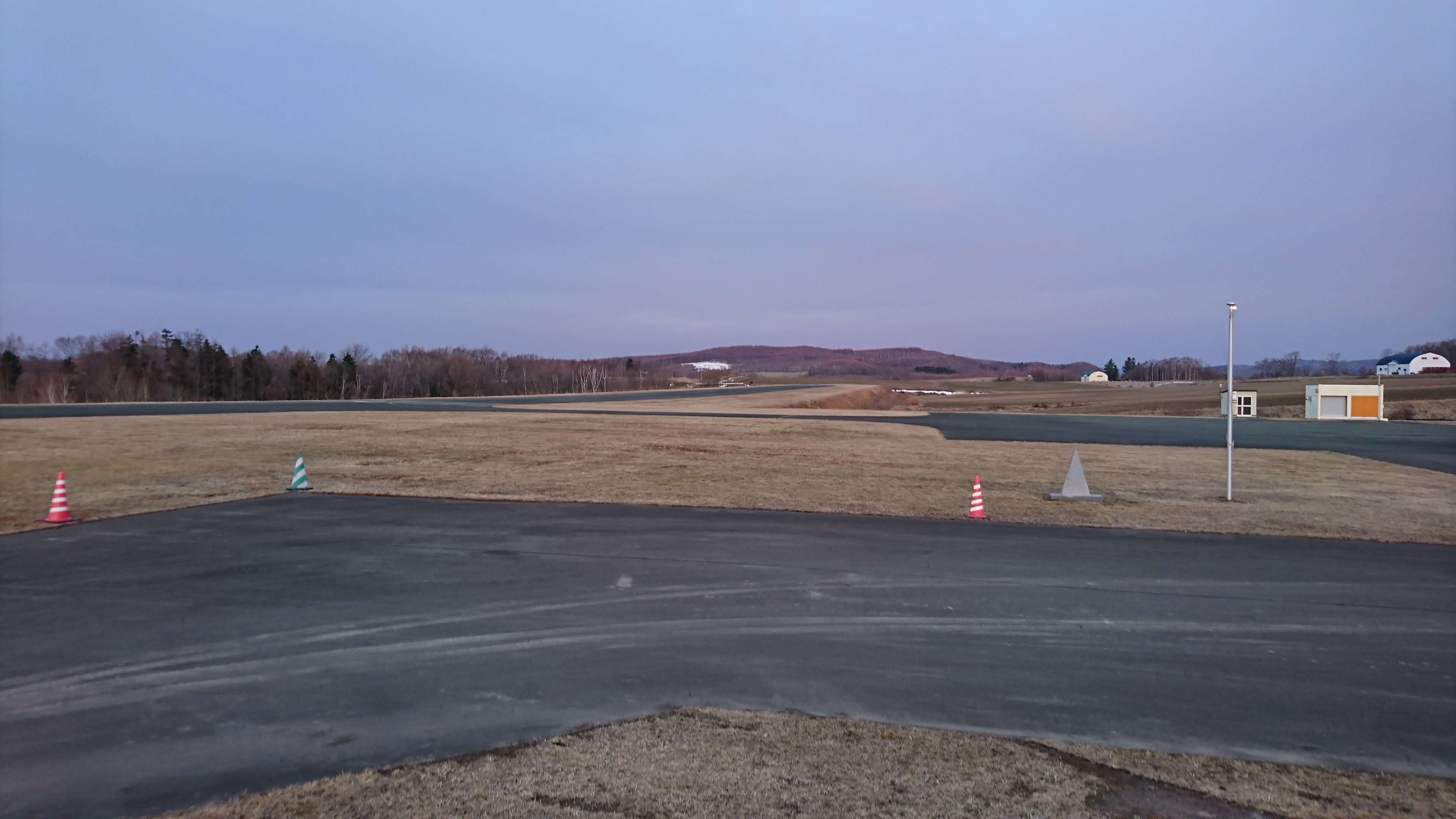 同滑走路遠望